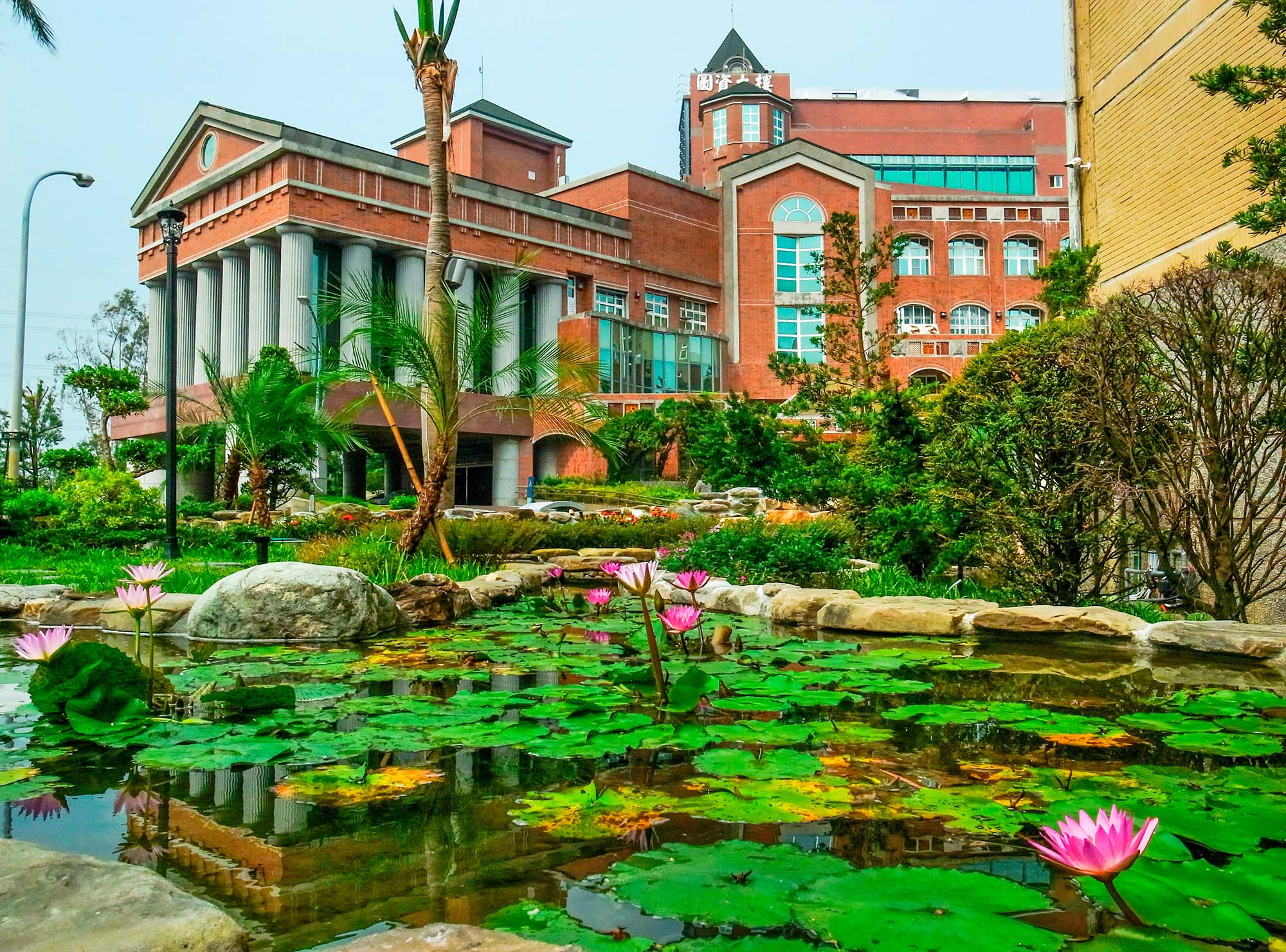 中文（台灣）: 高苑科技大學典範園區